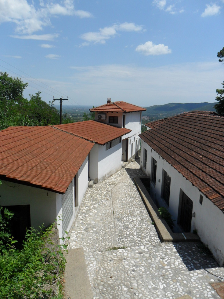 Άποψη 2017